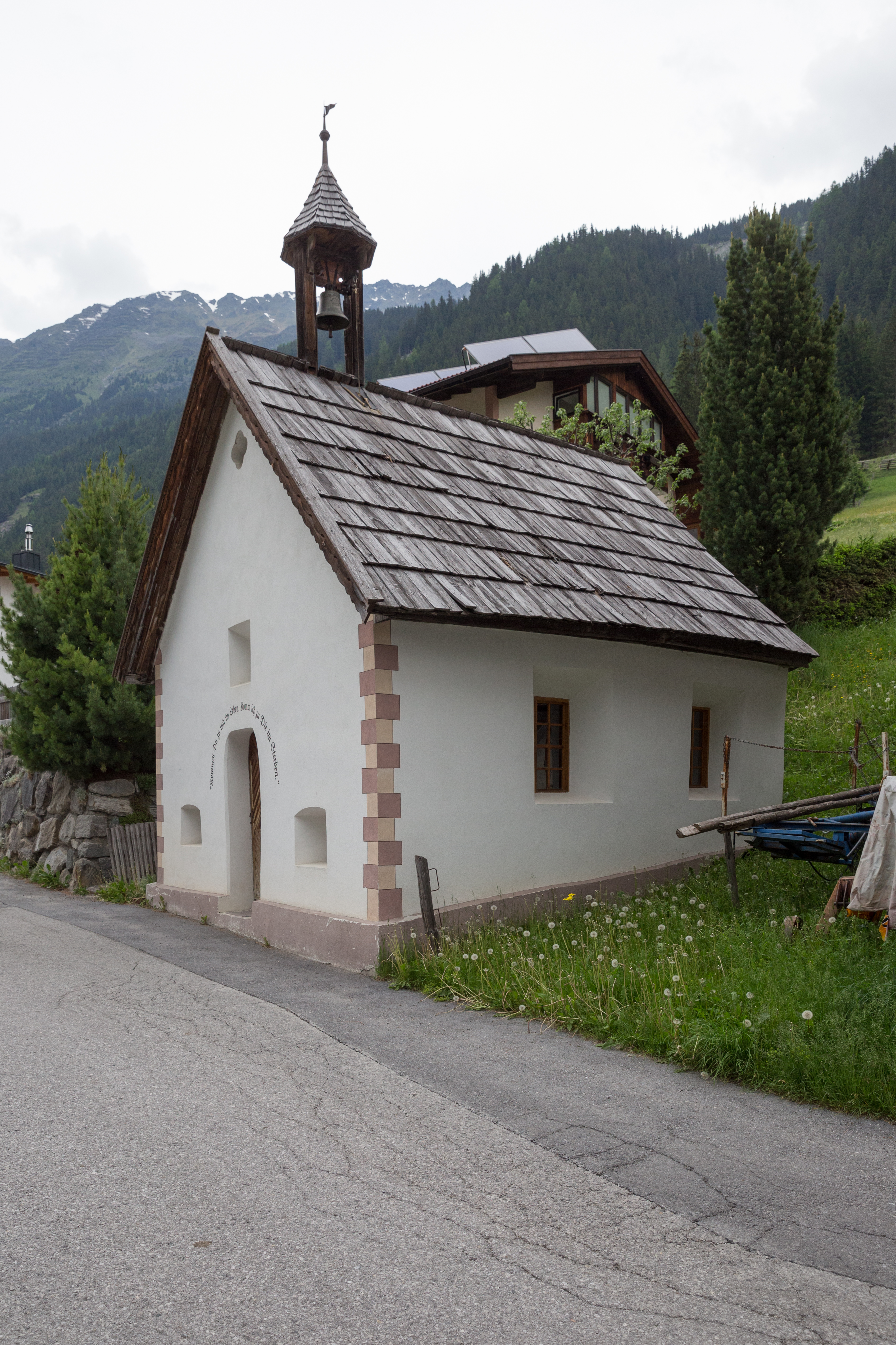 Mariahilfkapelle Enzenstall